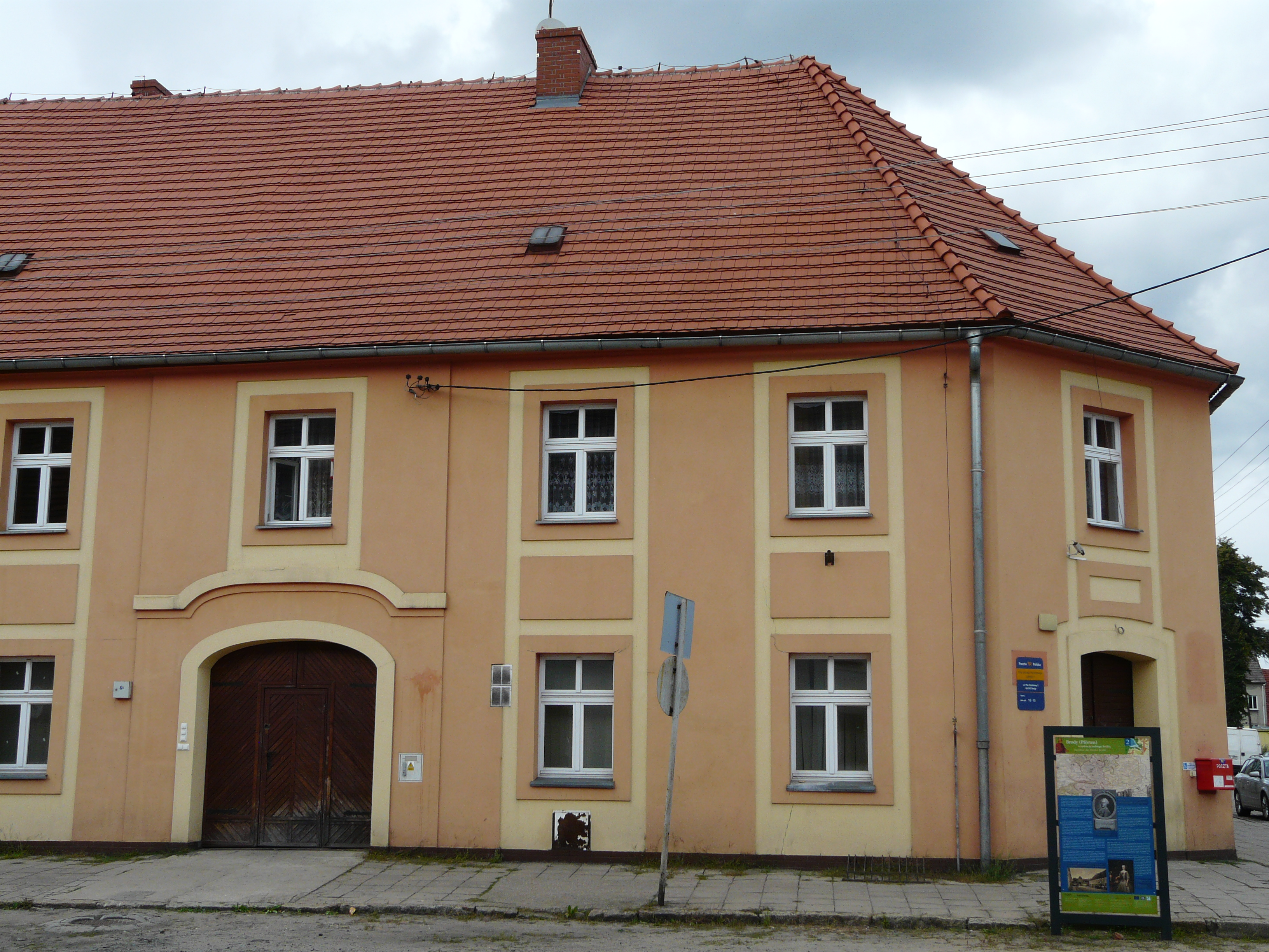 Brody - poczta, poł. XVIII 05.1963.